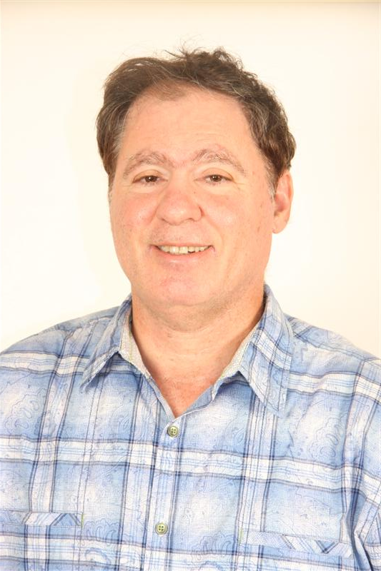 גדי ברזילי